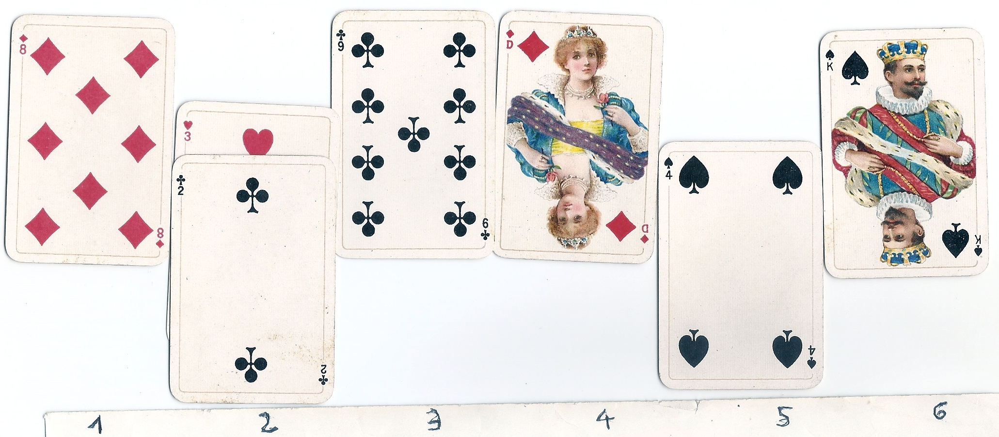 Ejemplo del juego de Eleusis